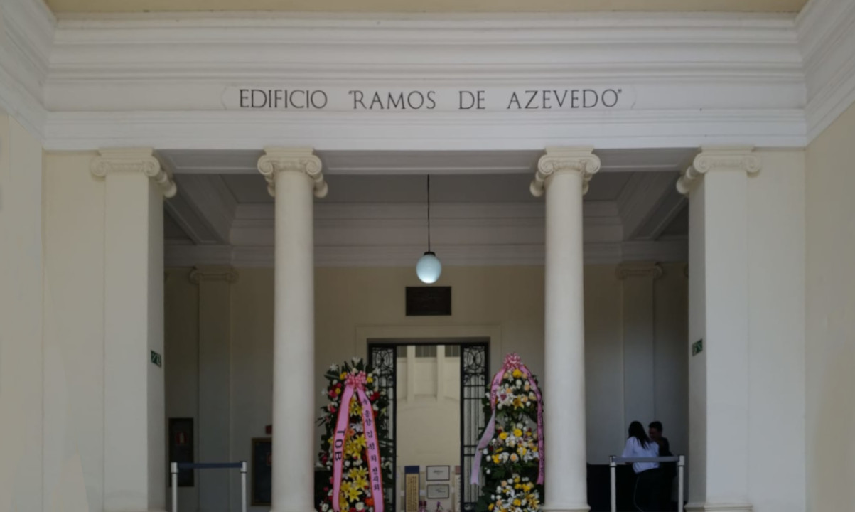 Entrada do Edifício Ramos de Azevedo, no Bairro do Bom Retiro, o prédio abriga o Arquivo Histórico Municipal